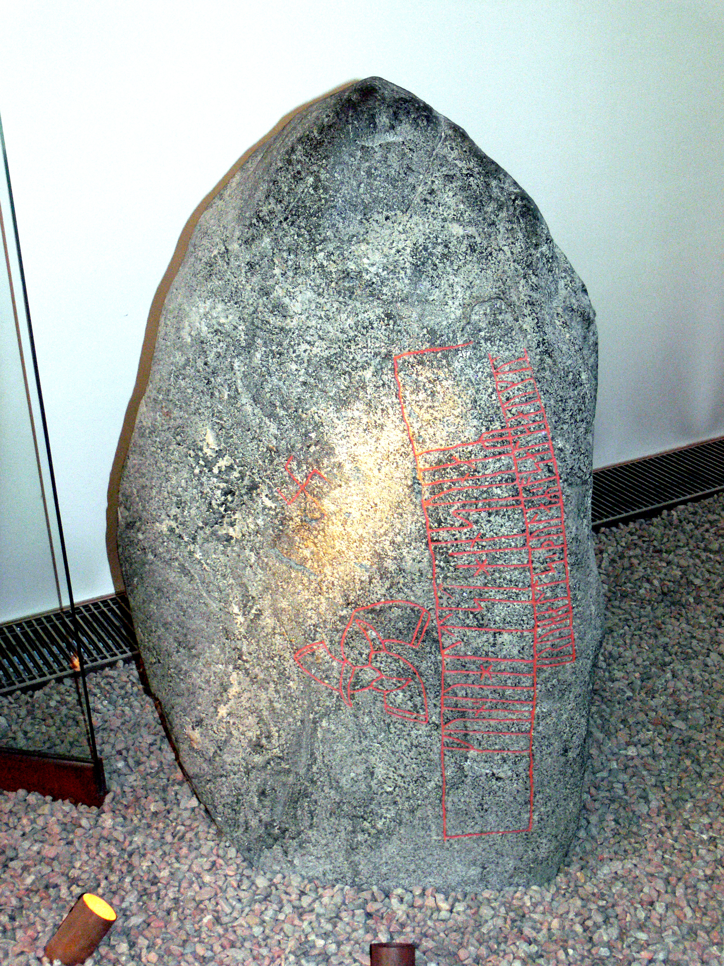 Runenstein von Snoldelev (Sjælland) im Museum Kopenhagen. Inschrift: “Gunvalds, des Sohnes von Roald, Stein, ein Þul (Weissager?) auf dem Salhügel”